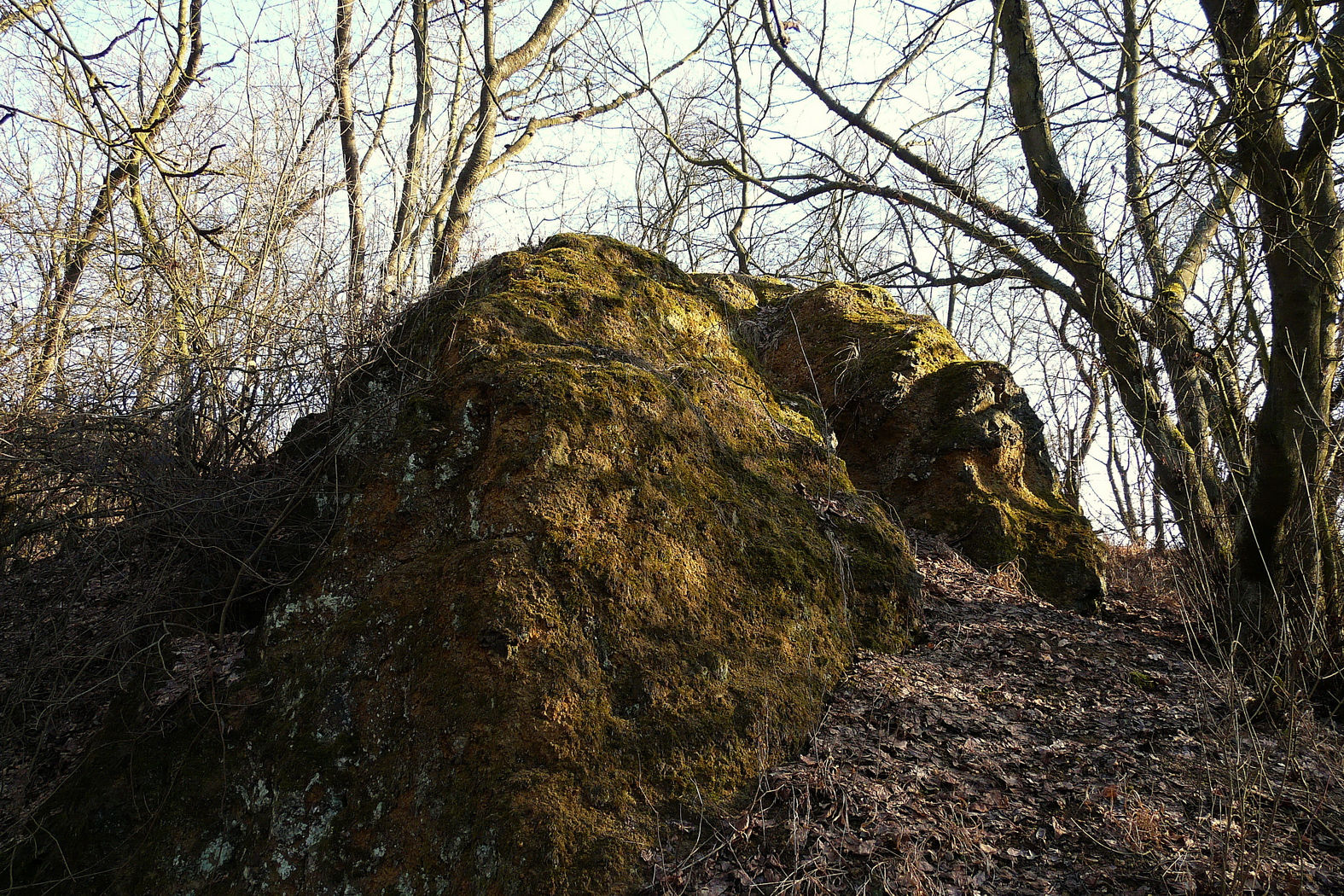 Skalka kamenolomu na vrchu Jezírka